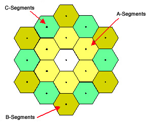 3 различных способа установки зеркал телескопа JWST